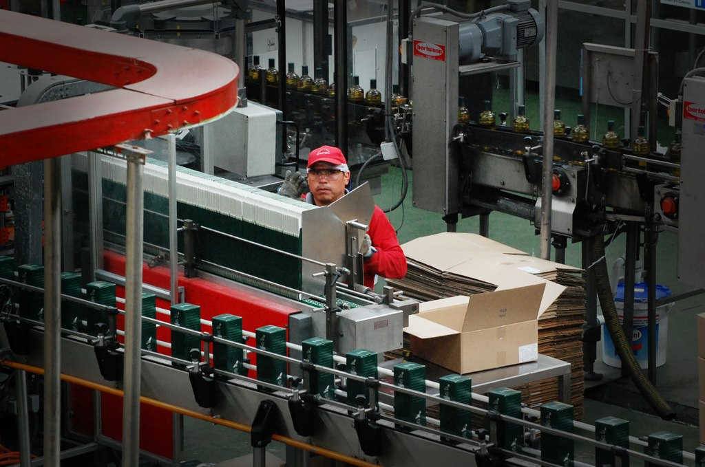 Planta CAPEL. Botellas de pisco Alto del Carmen